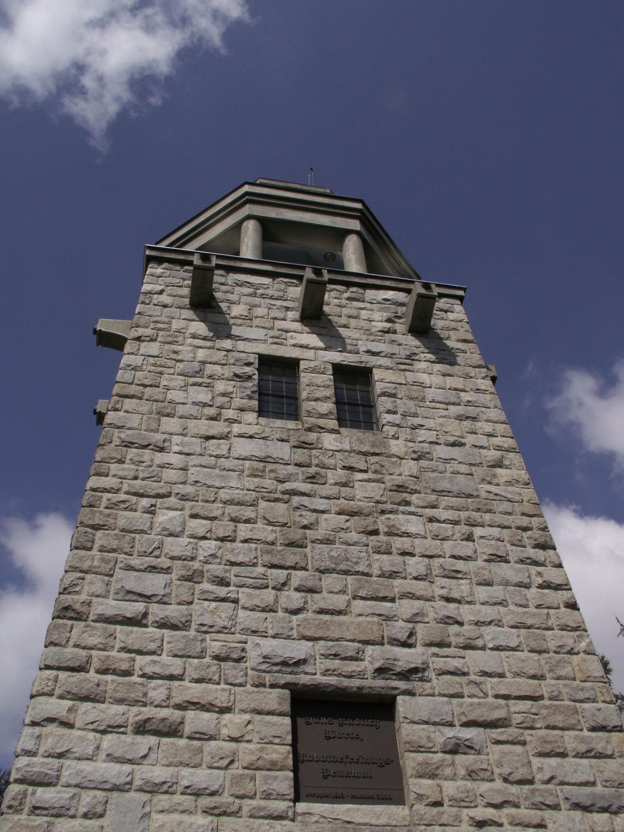 detail rozhledny Úvalno na vrchu Strážiště s pamětní deskou Hanse Kudlicha